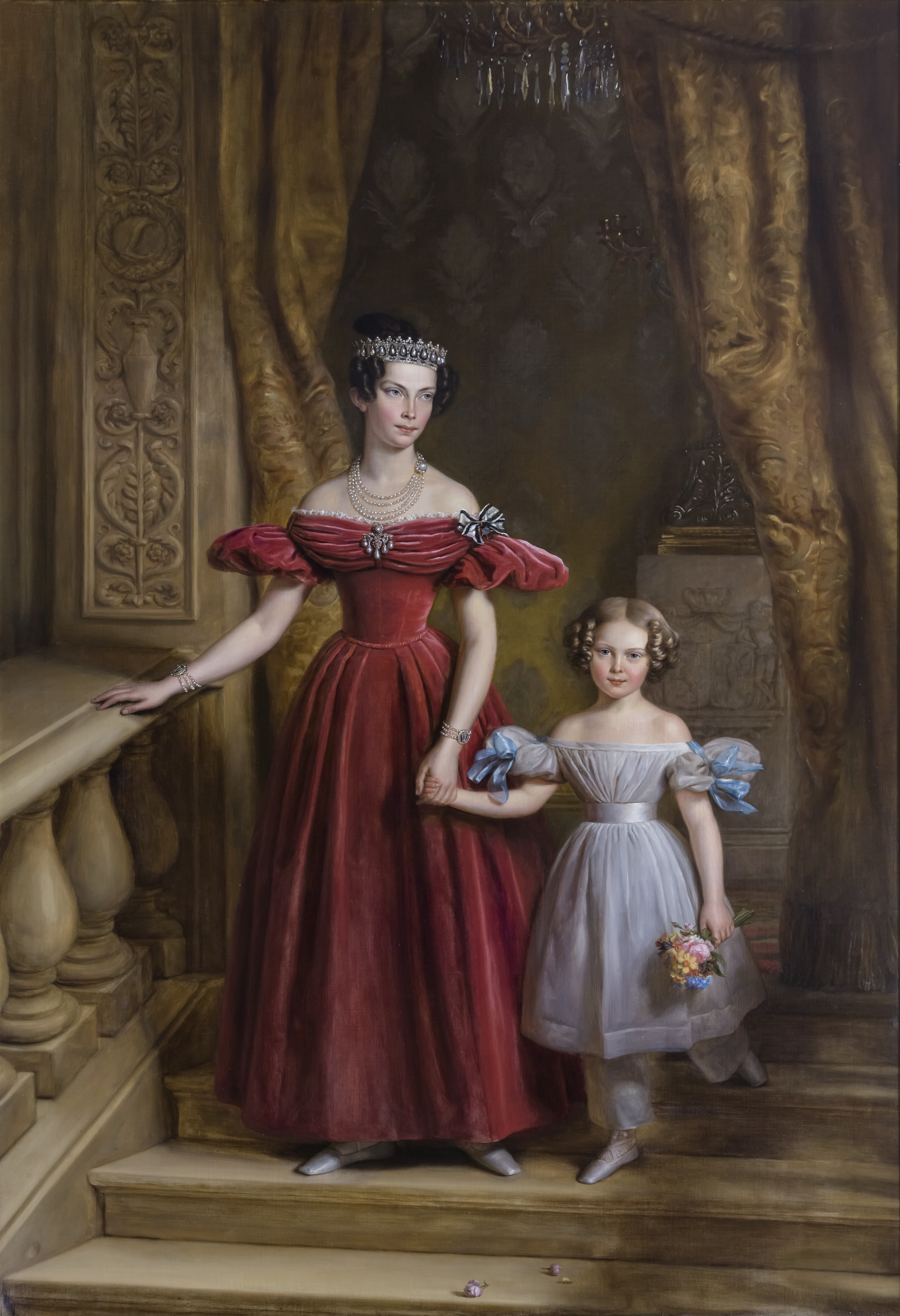 Louise van Pruisen, prinses der Nederlanden (1808 - 1870) Louise, koningin van Zweden, prinses der Nederlanden (1828 - 1871)